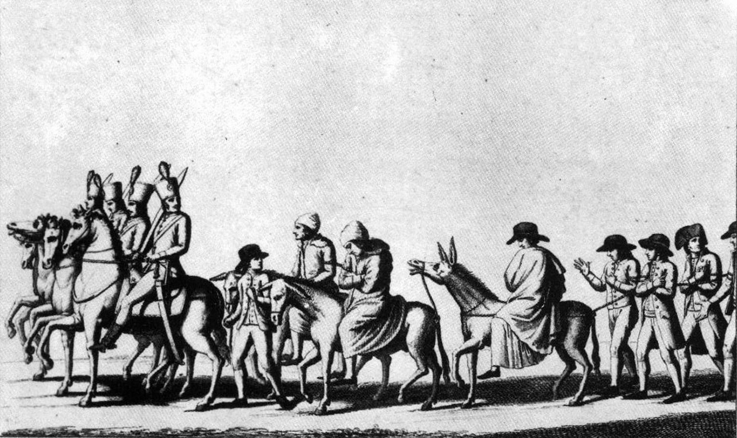 Gli ultimi consoli della Repubblica romana giacobina portati in corteo a Roma come delinquenti